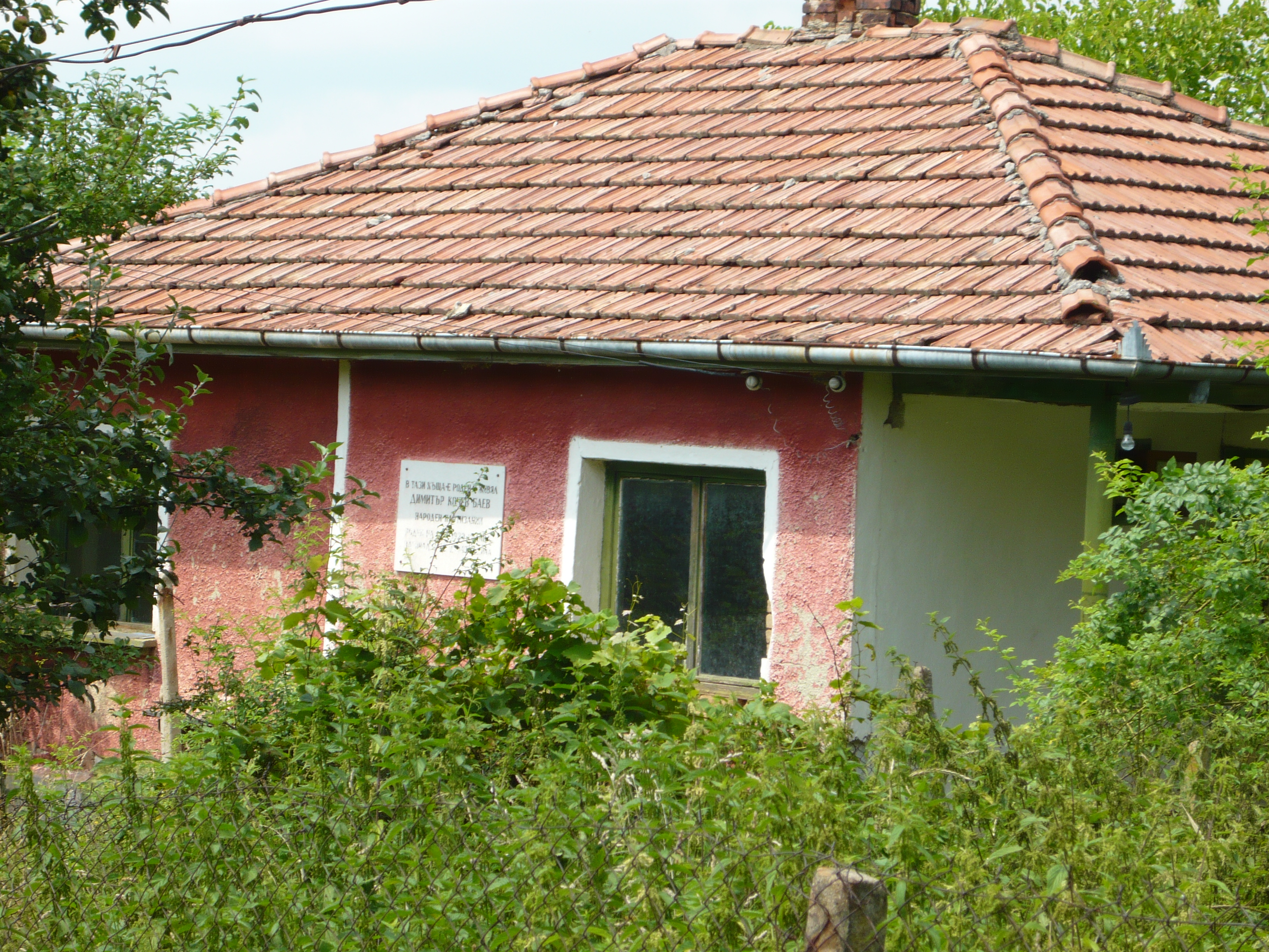 няма